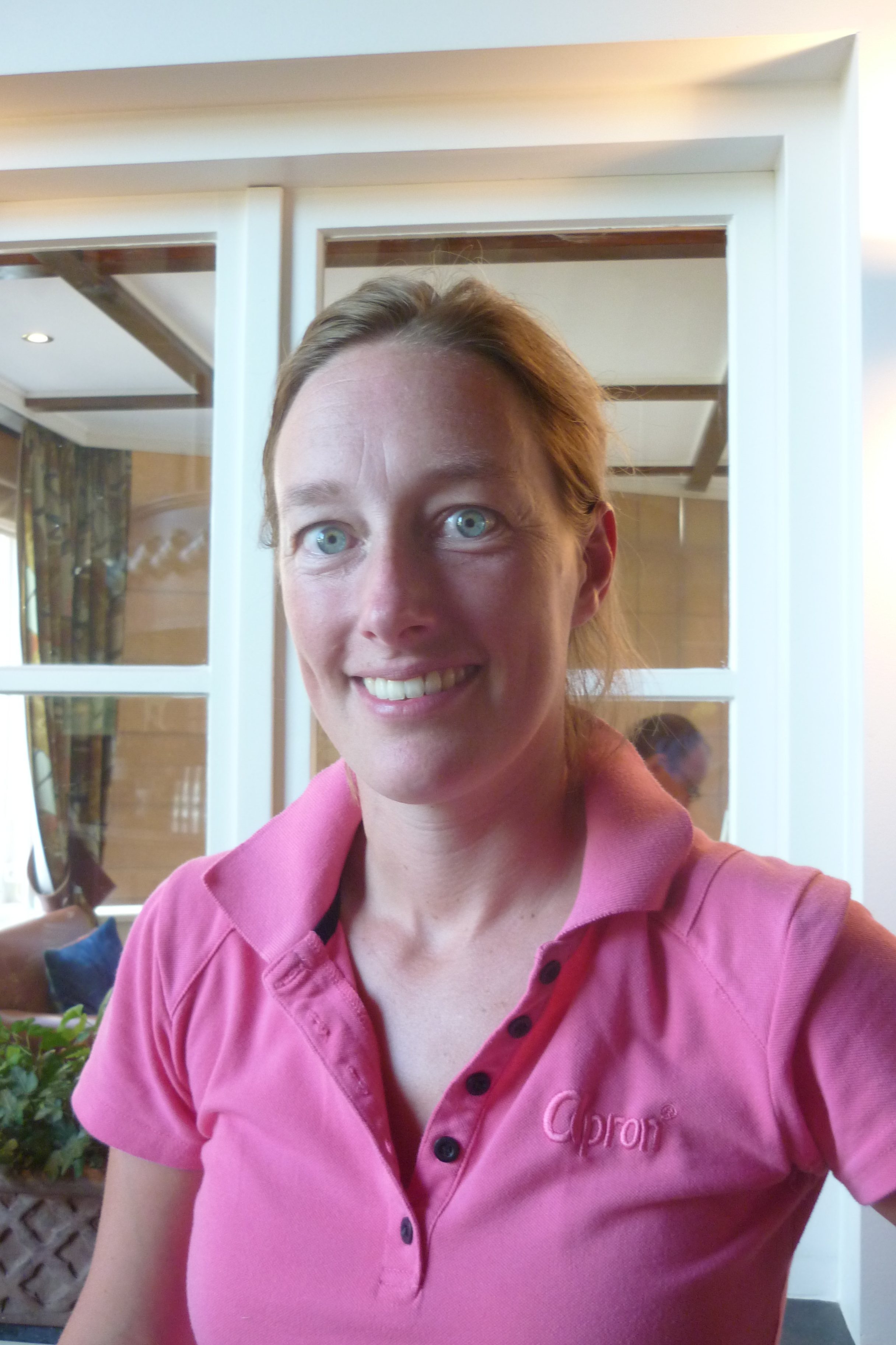 Joan vd Kraats tijdens Nationaal Open 2012